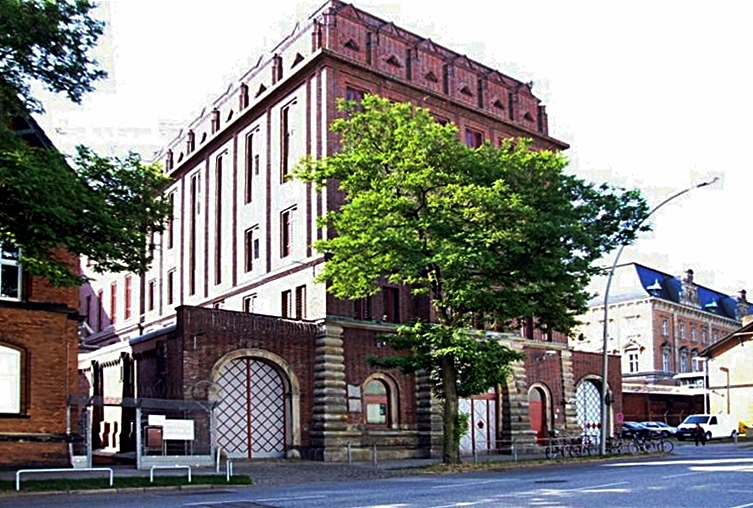 Untersuchungshaftanstalt Hamburg, Holstenglacis 3, Haupteingangsbereich